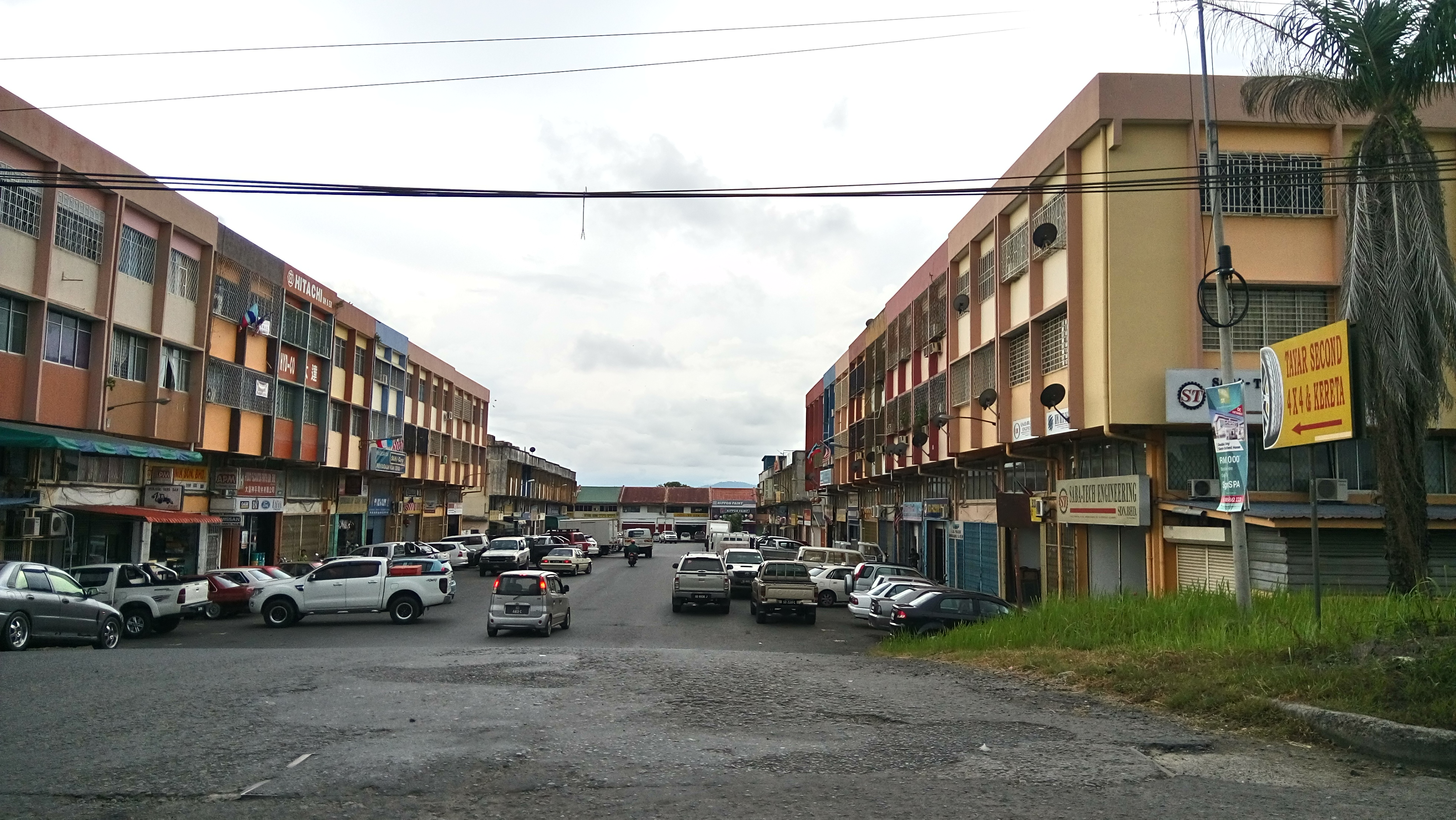 Bandar satelit di Lahad Datu